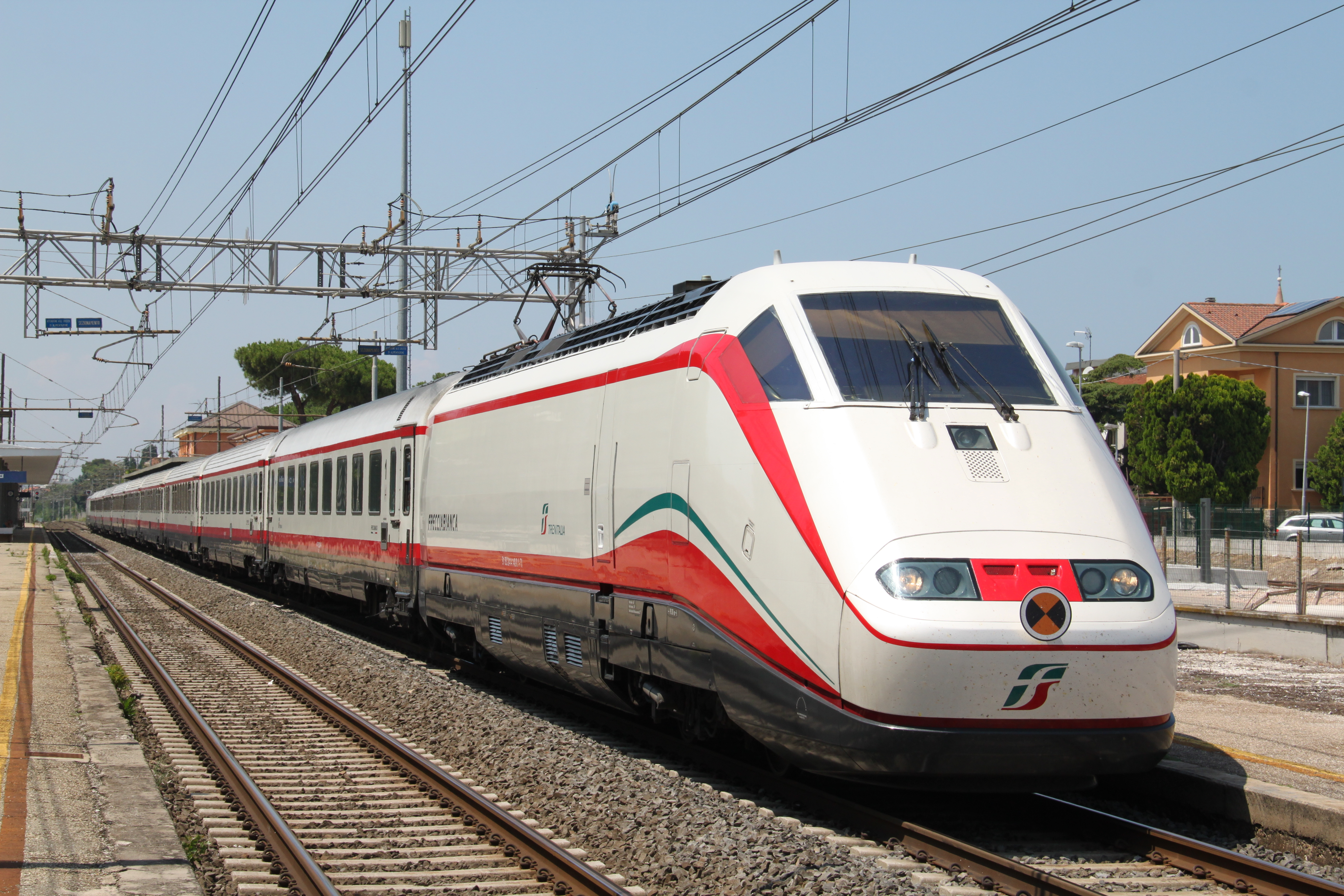 Frecciabianca 9809 arriving at Cattolica railway station.